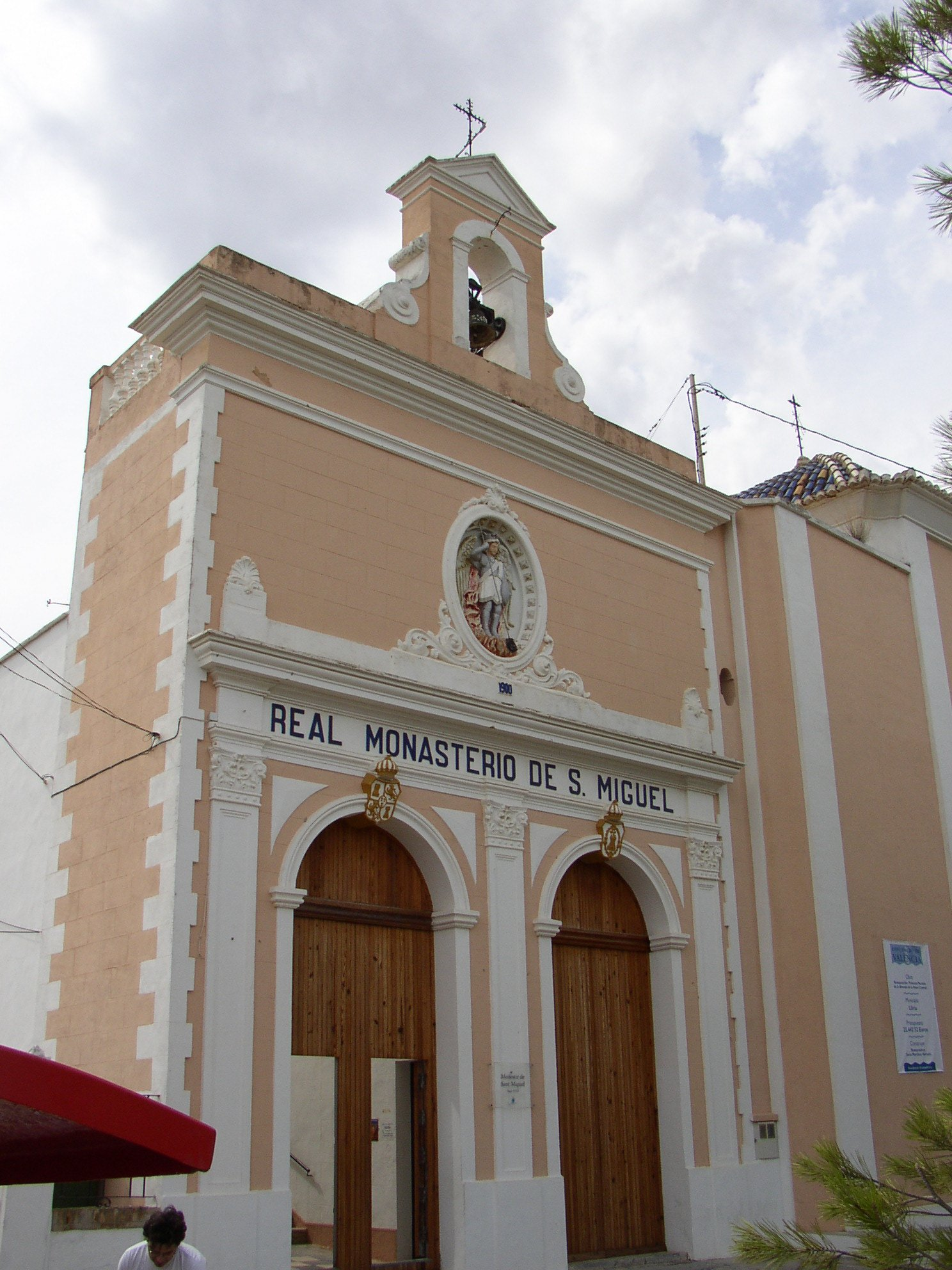 Valencia. (Comunidad Valenciana. España) Liria. Monasterio de San Miguel. Siglo XVIII . Fotografía realizada el 24 septiembre de 2006 por el autor. User:Pelayo2